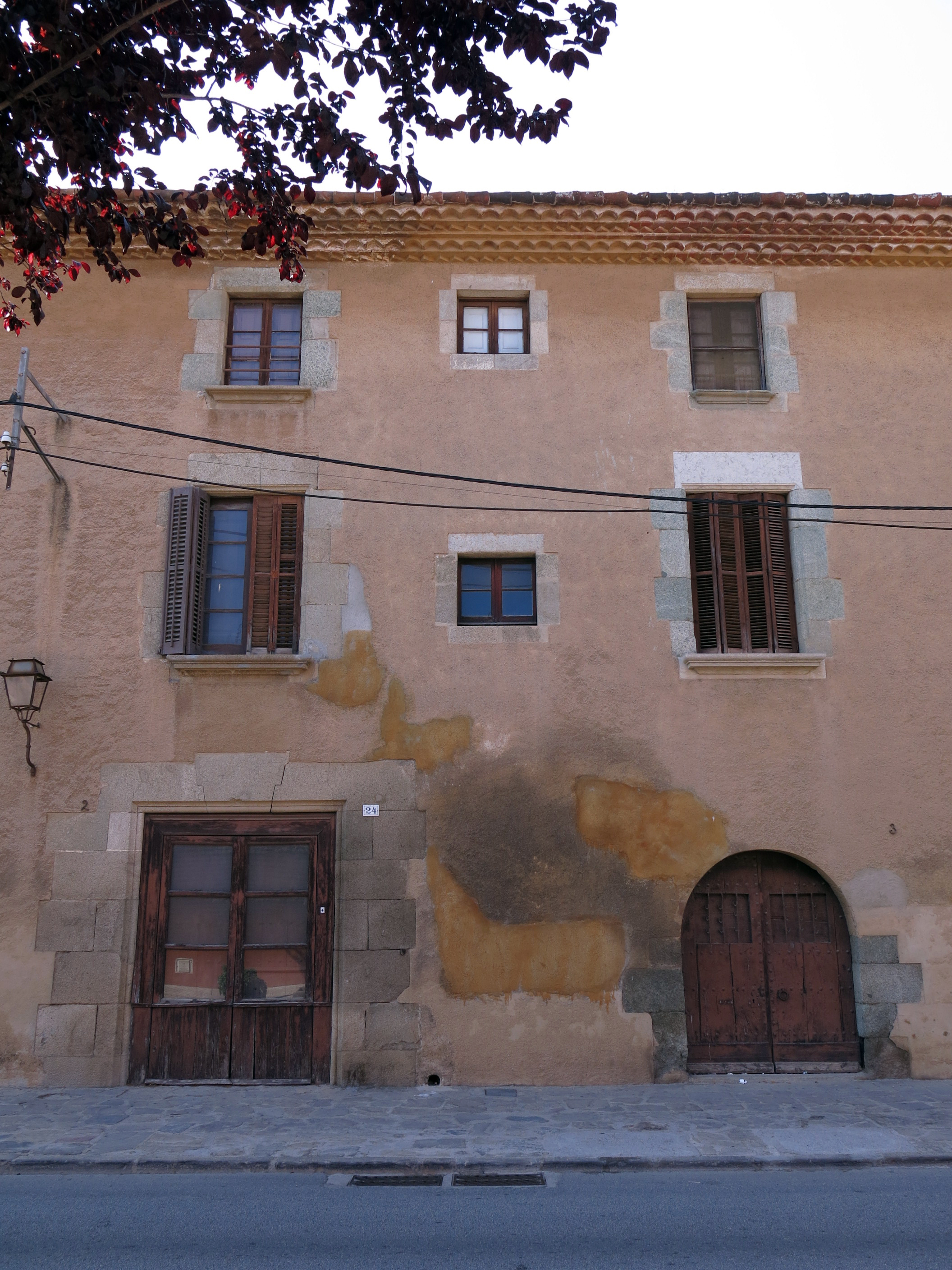 Can Mandri (Sant Andreu de Llavaneres)